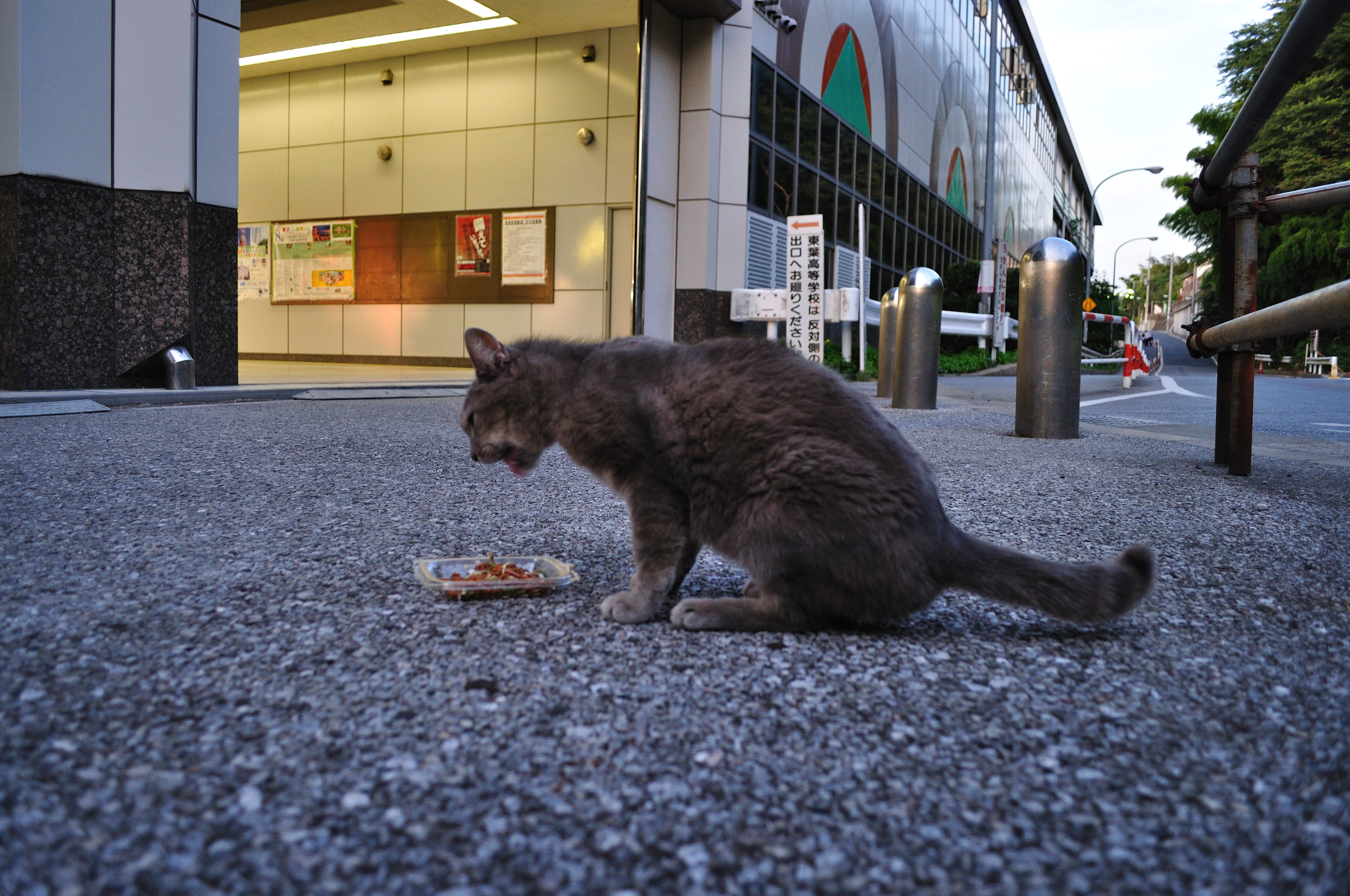 東葉高速鉄道 飯山満駅と駅猫みーちゃん